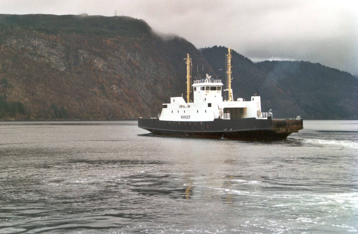 M/F Bruvik, built 1980.